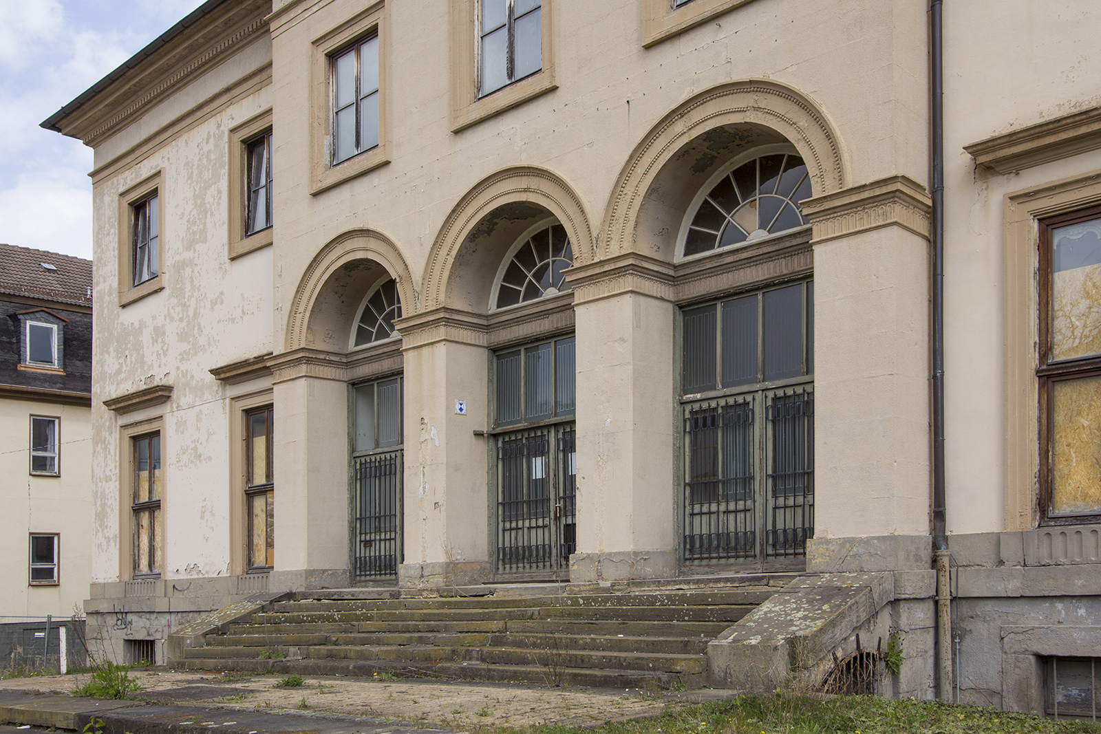 Gotha, Prinzenpalais, Freitreppe (2017)